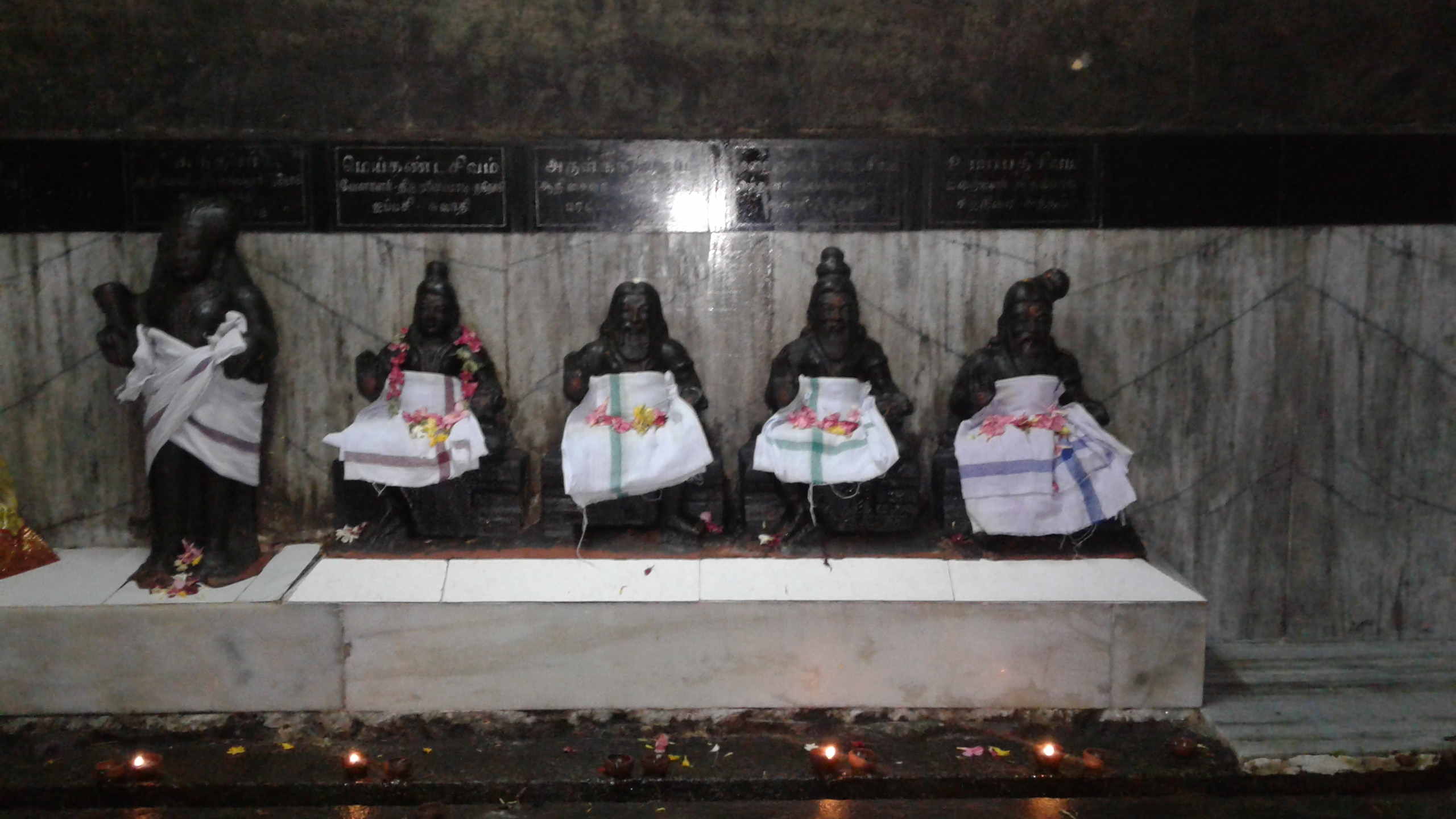 சந்தான குரவர்கள்